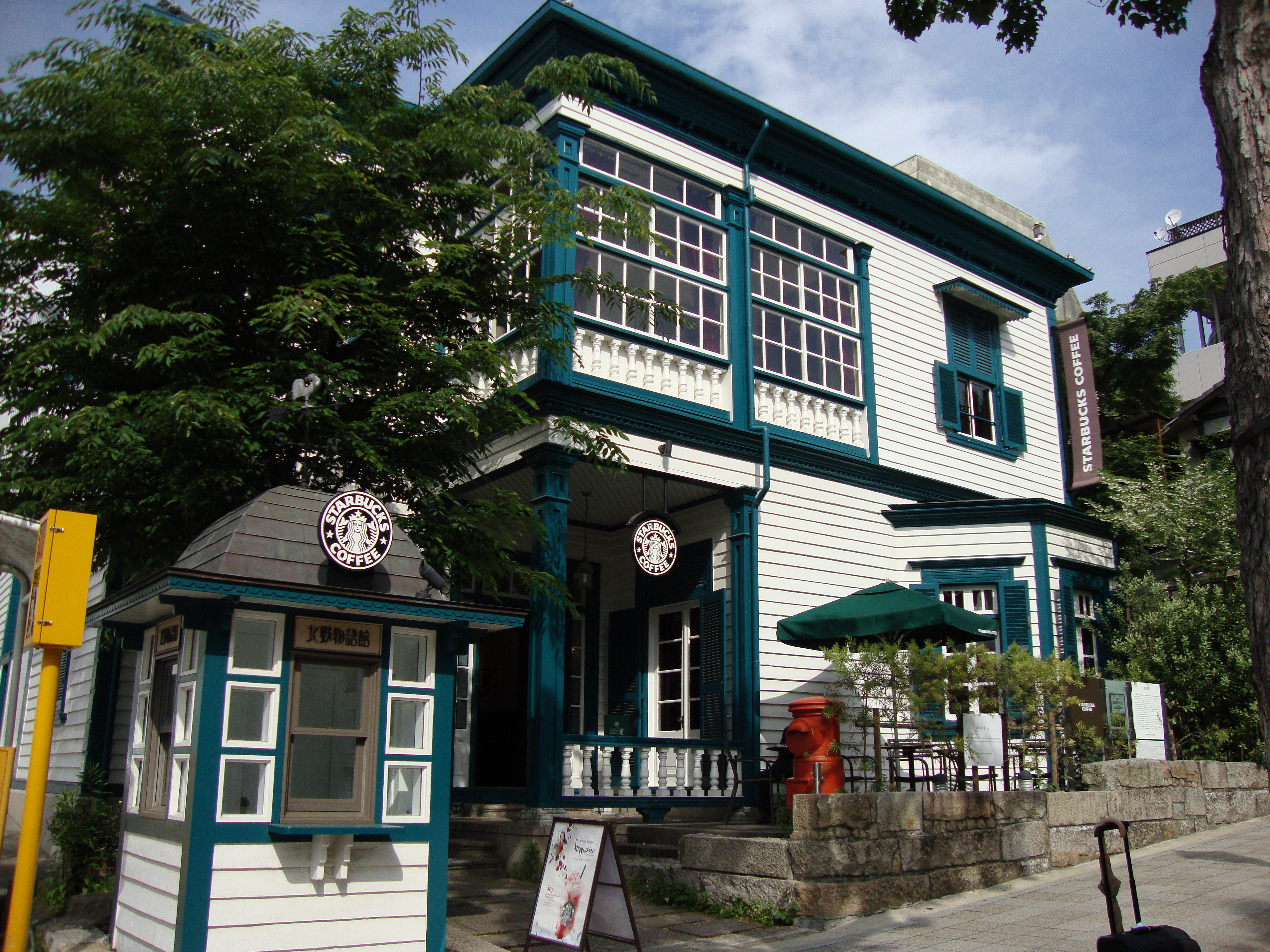 スターバックスのコンセプトストア「神戸北野異人館店」外観